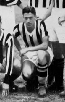 Il calciatore italiano Francesco Rier alla Juventus nella stagione 1930-31.